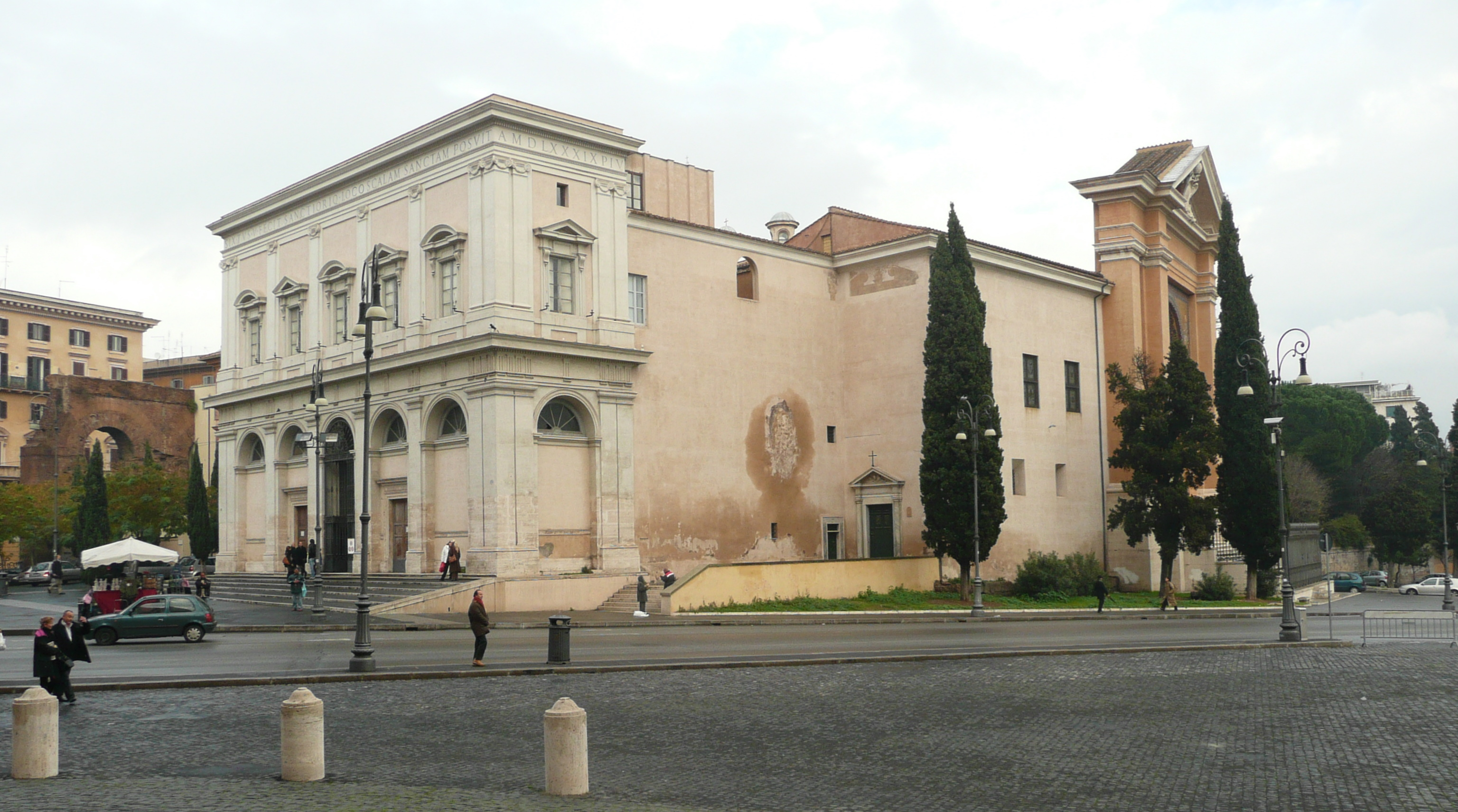 Scala Santa; Piazza di San Giovanni in Laterano, Rome